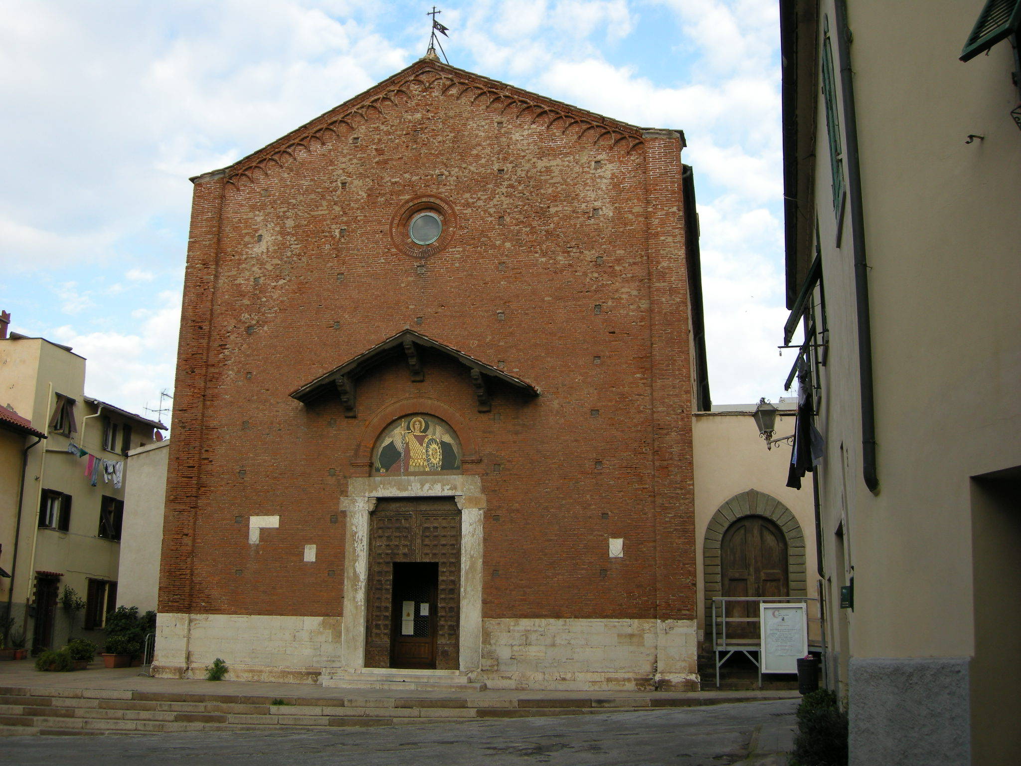 Sant'Antimo